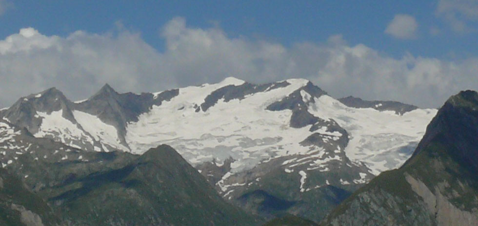 Blick auf die gletscherbedeckten Simonyspitzen (3.481 m bzw. 3.488 m) von Südosten aus (Muhsweg). Im linken Bildteil die beiden Gubachspitzen.